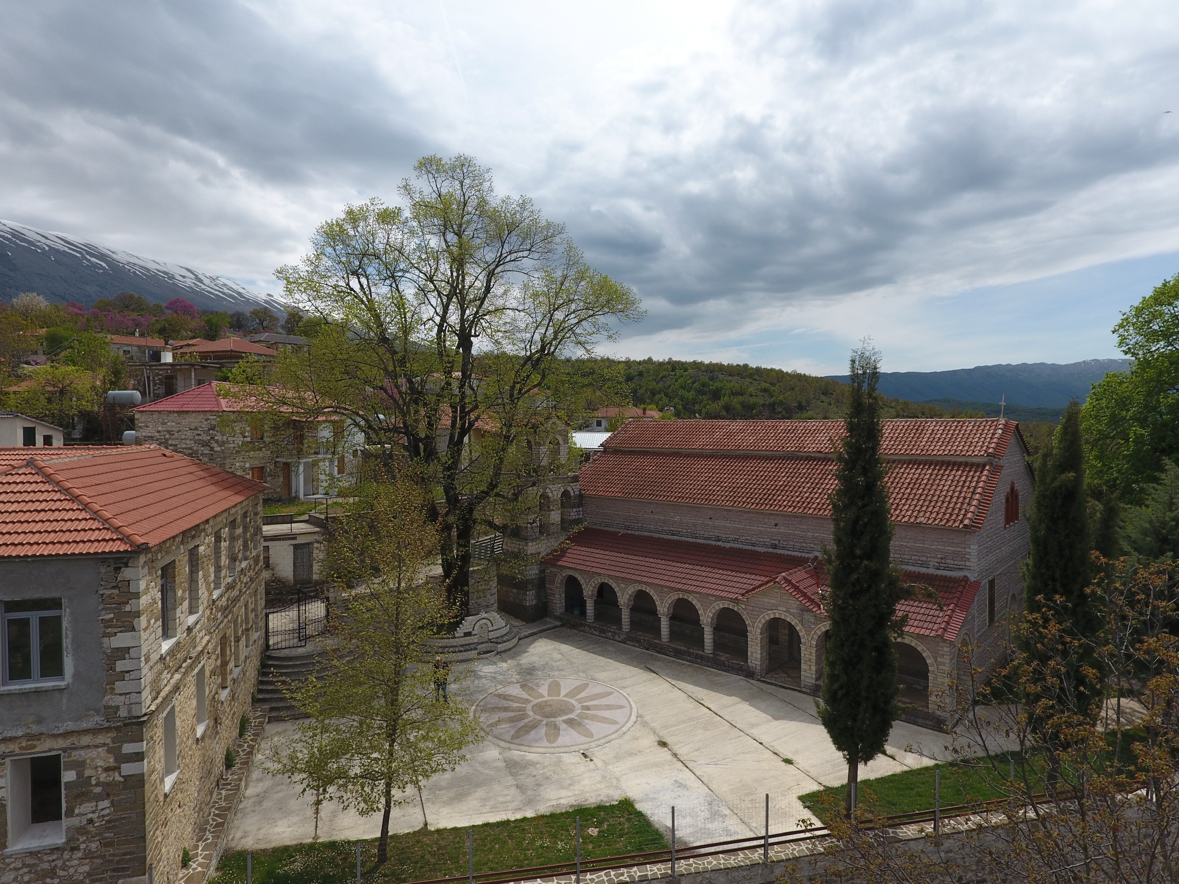 Σχωριάδες Πωγωνίου, η μεγάλη εκκλησία του χωριού - Η Γέννηση της Θεοτόκου